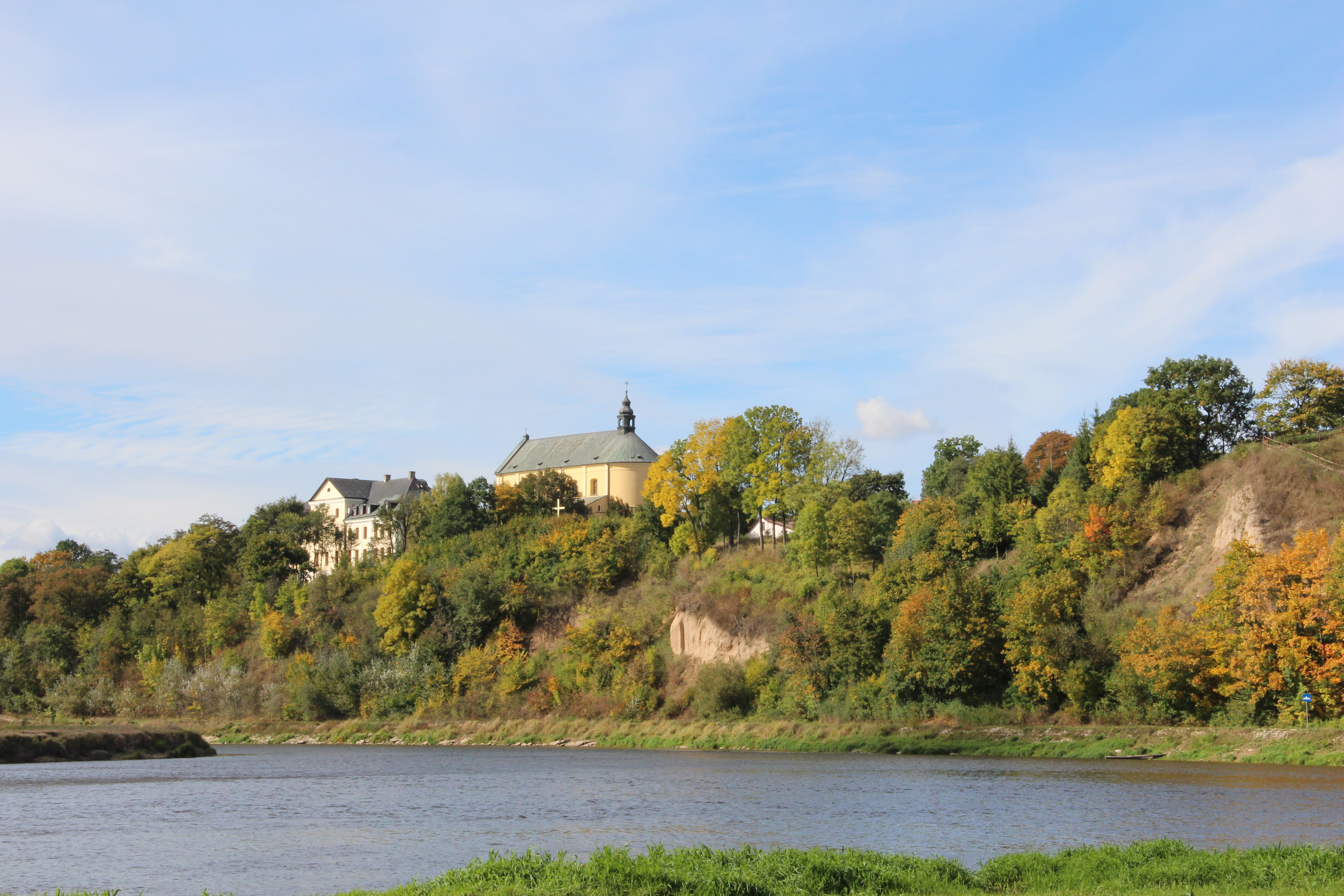 Widok na Drohiczyn znad Bugu.